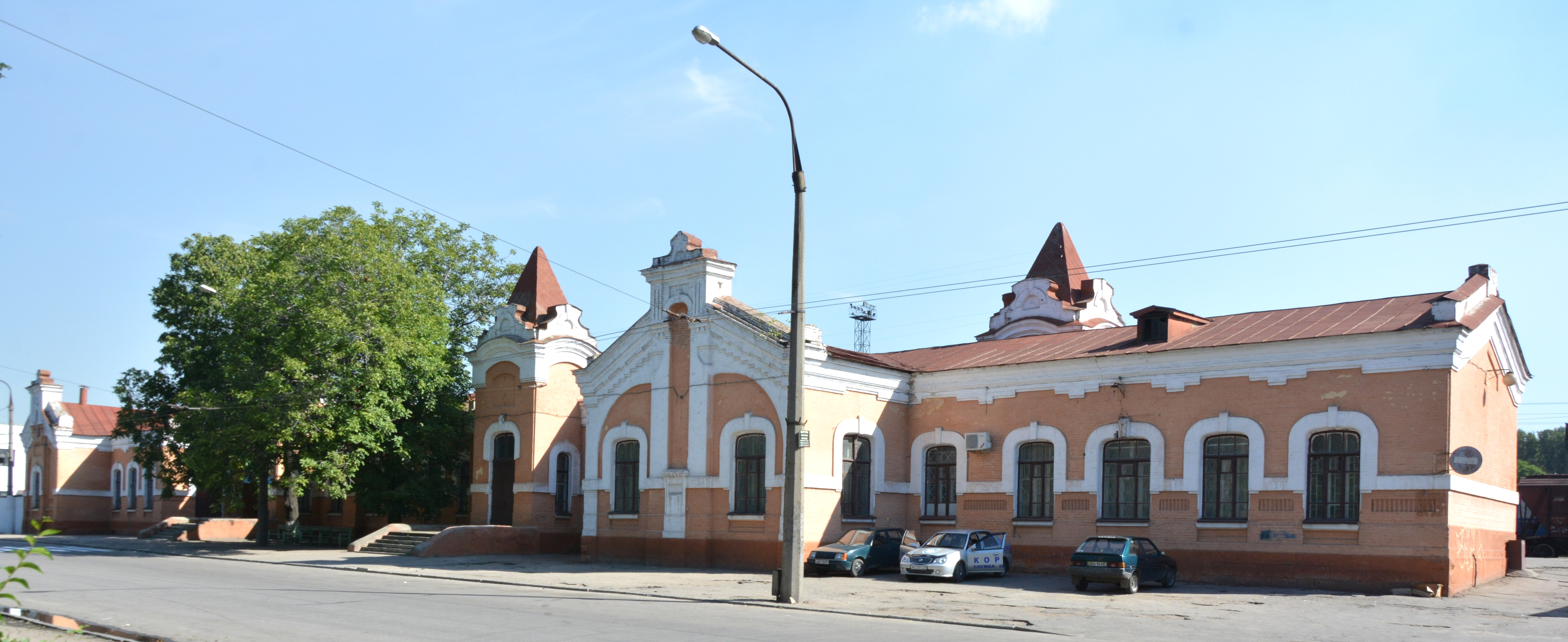 Вокзал «Олександрівськ» (вокзал Запоріжжя-2), Запоріжжя, вул. Костянтина Великого, 9